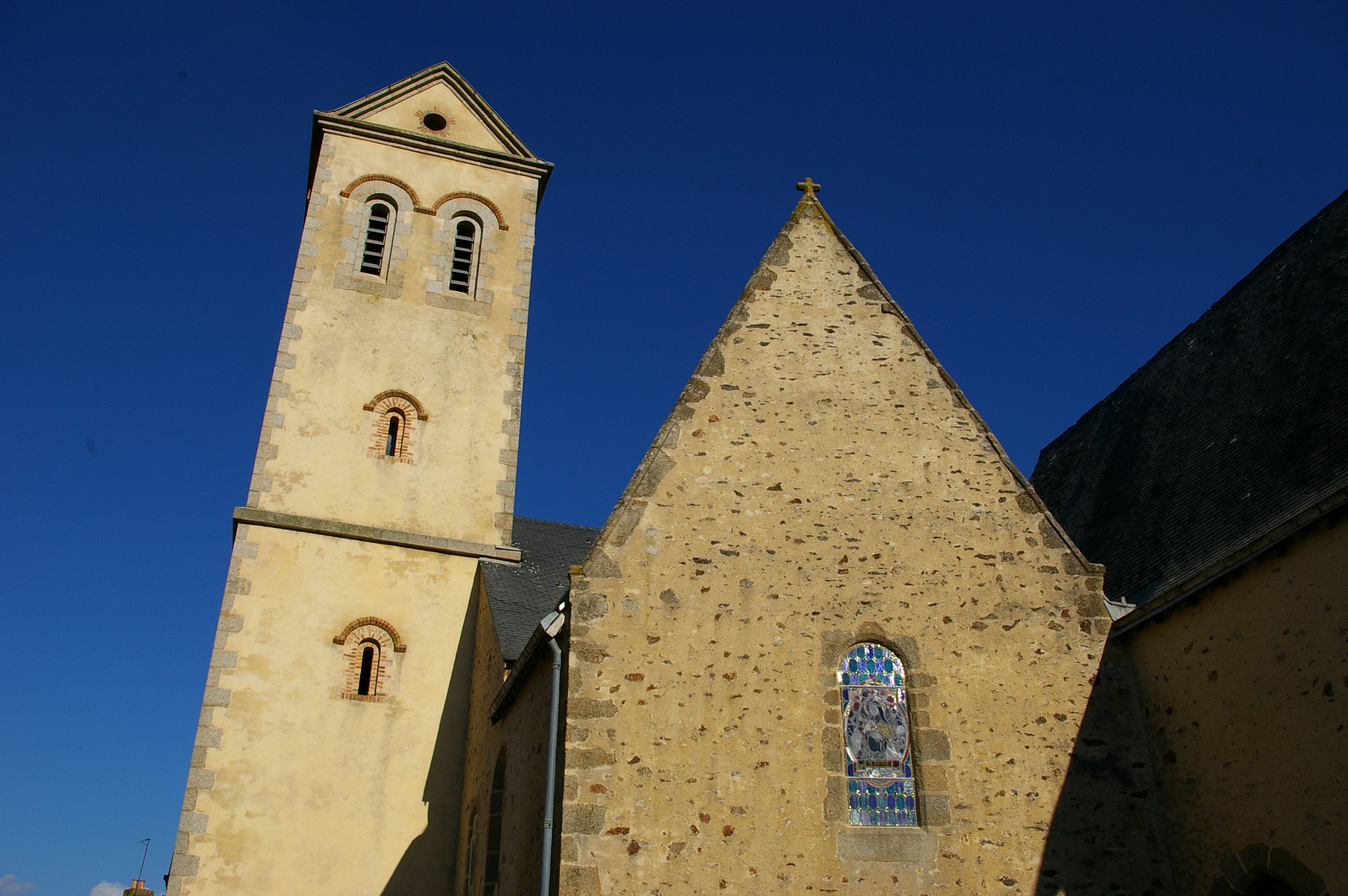 Eglise saint-Vigor de Neau (Mayenne)